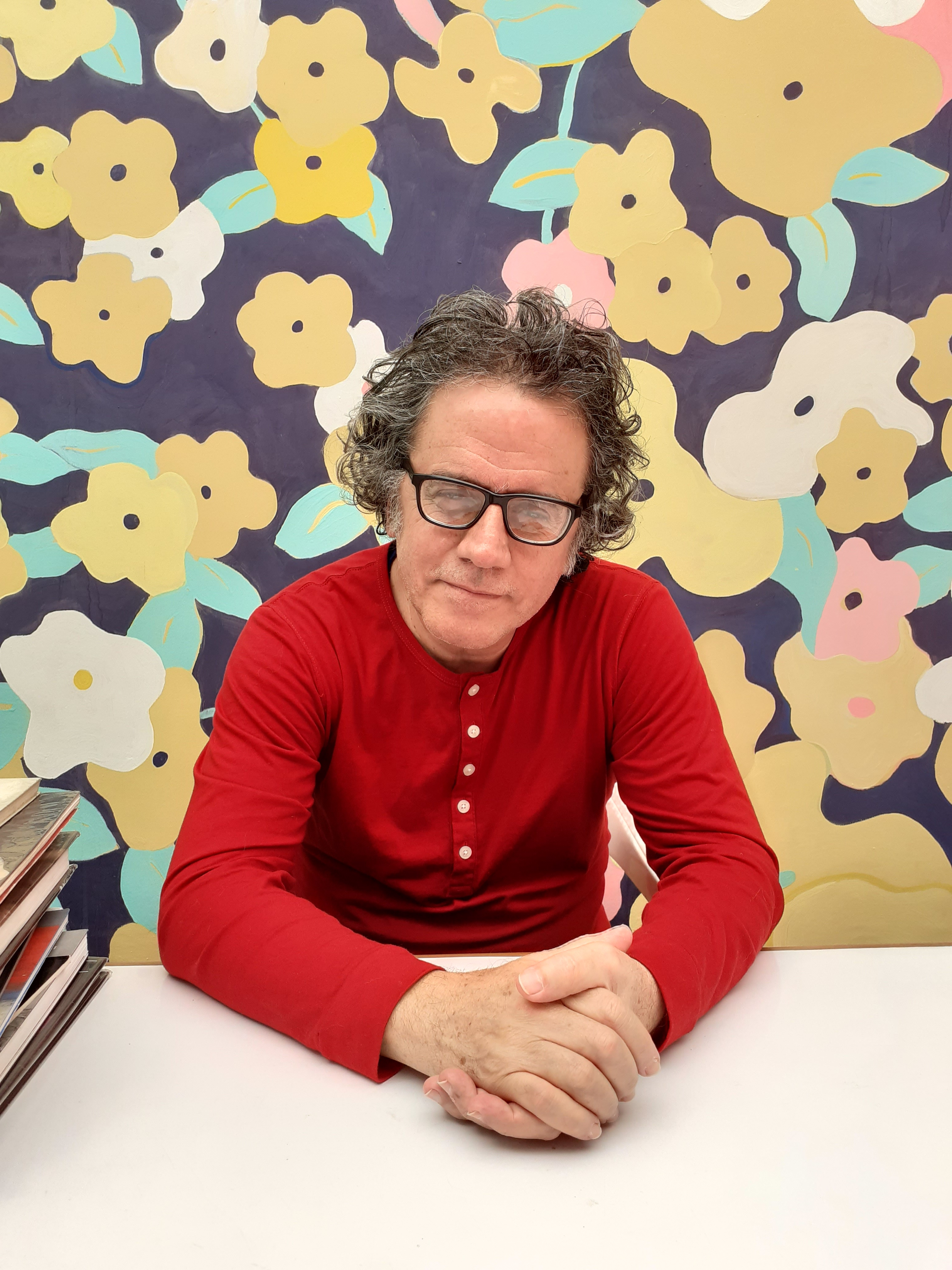 Pedro Cornejo, Octubre 2019